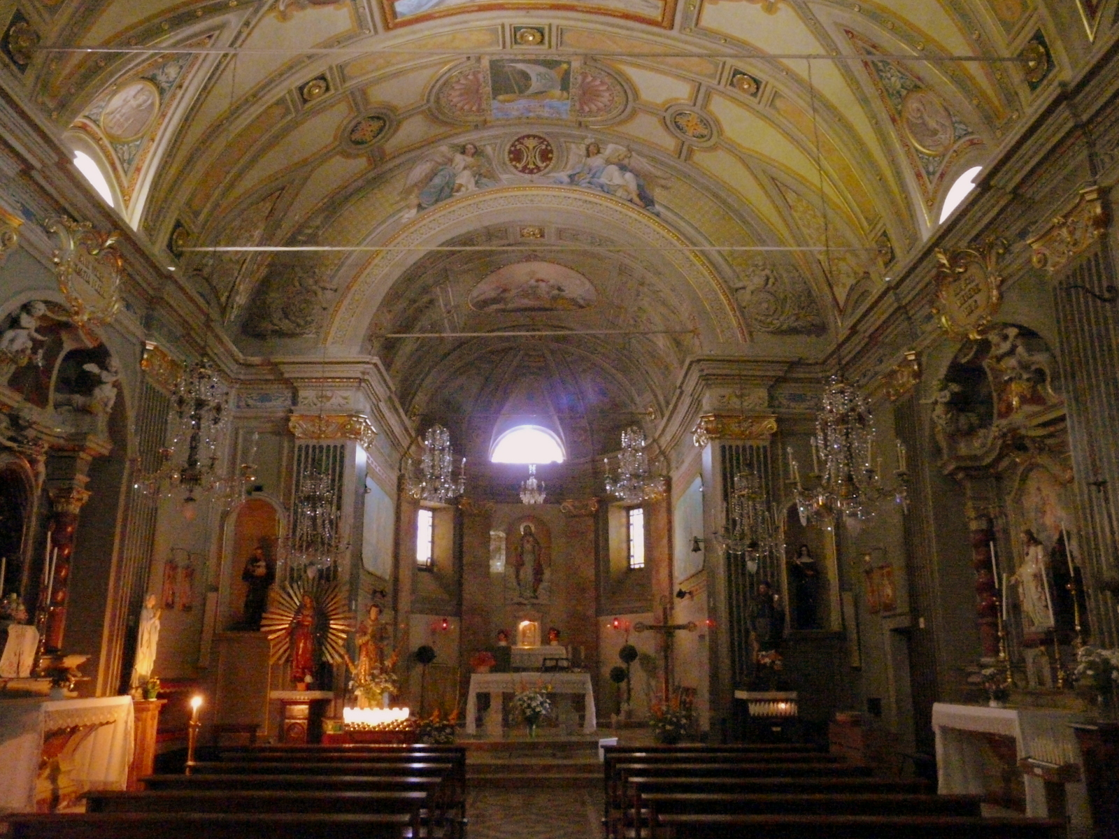 Navata della chiesa dell'Addolorata, Fontanarossa, Gorreto, Liguria, Italia